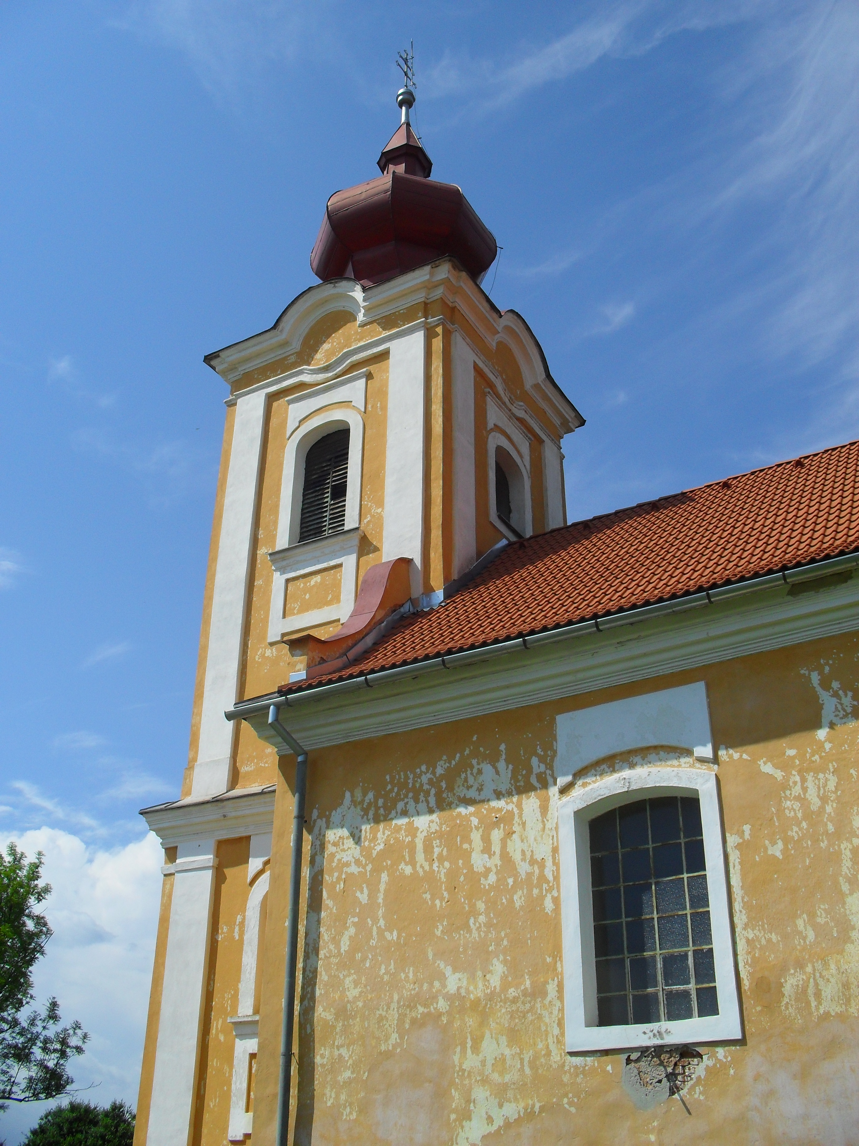 Gömörfalva - katolikus templom